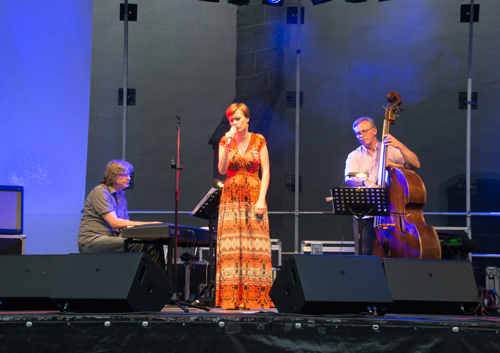 Detmolder Sommerbühne, 08.08.2014: Krisse & Rox feat. Gabriela Koch; im Bild: Georg Rox, Gabriela Koch, Fritz Krisse